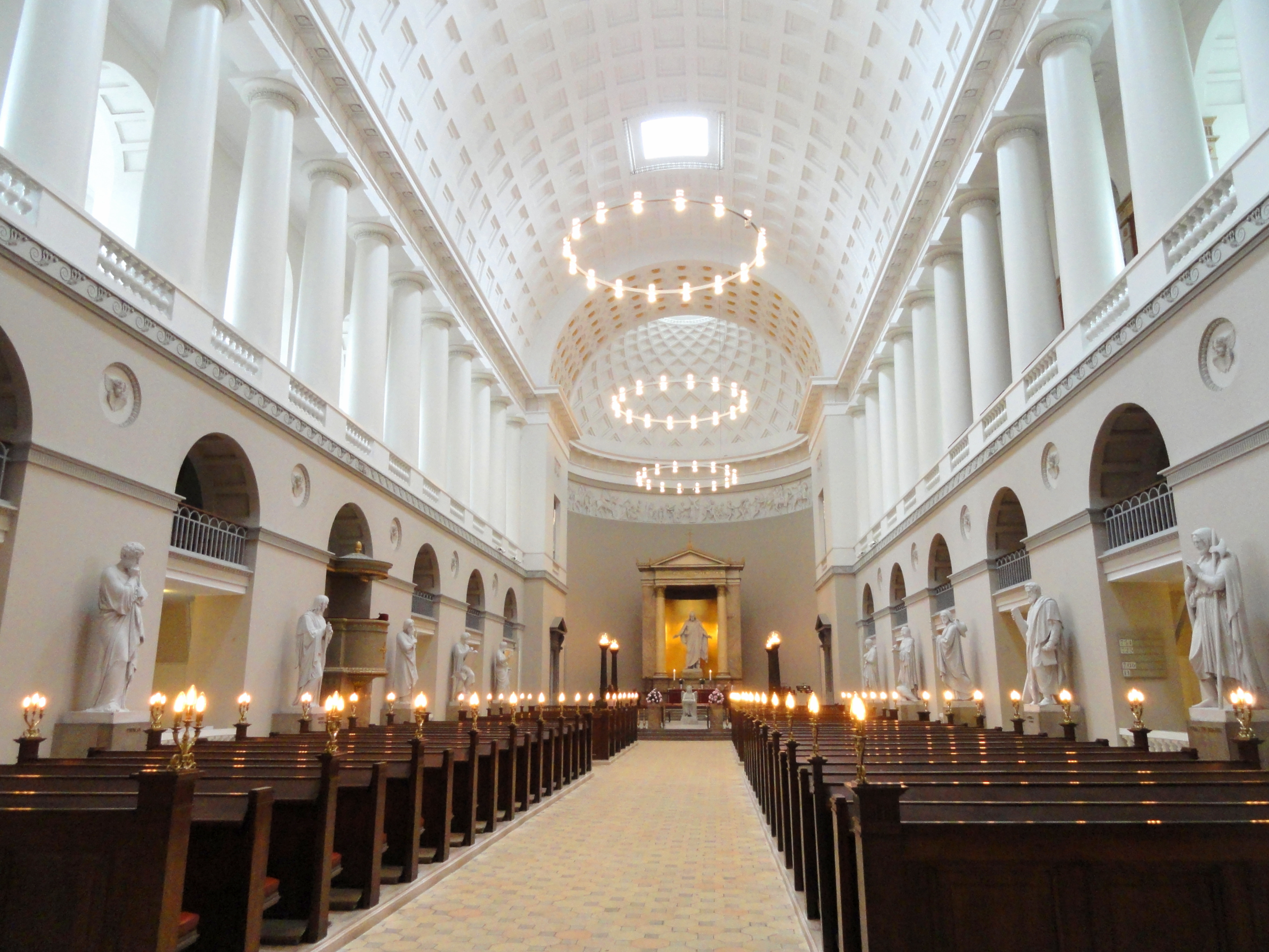 Interior view of Københavns Domkirke, Copenhagen, Denmark.